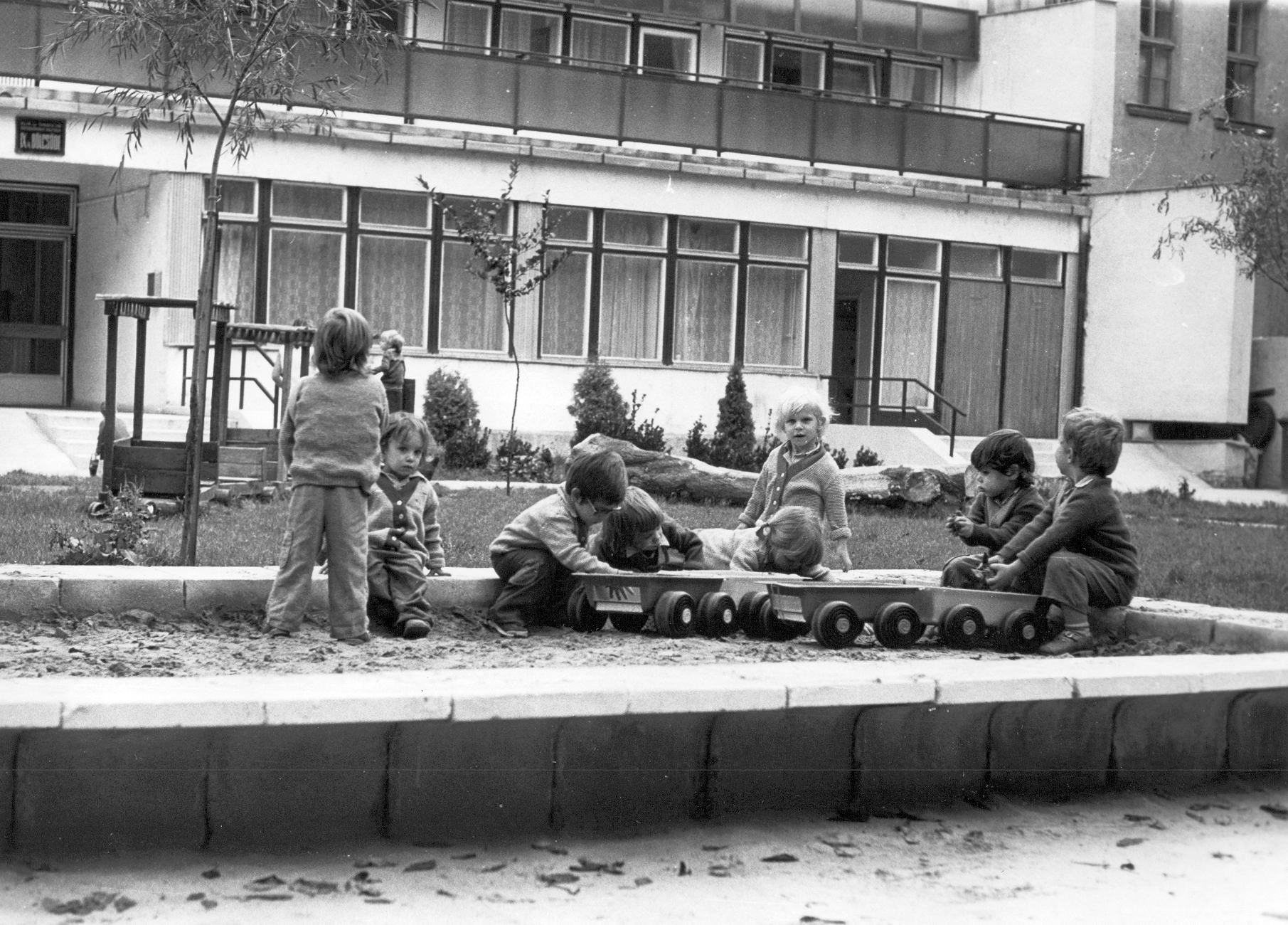 Ráday utca 46. Bölcsőde. Location: Hungary, Budapest IX. Tags: kid, toy, Budapest Title: Ráday utca 46. Bölcsőde.